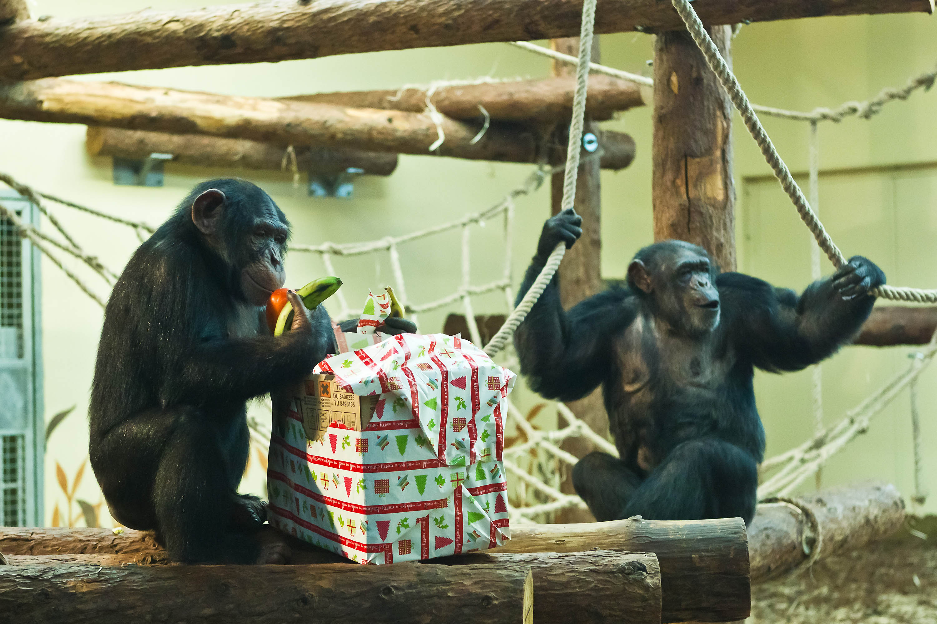 Common Chimpanzee